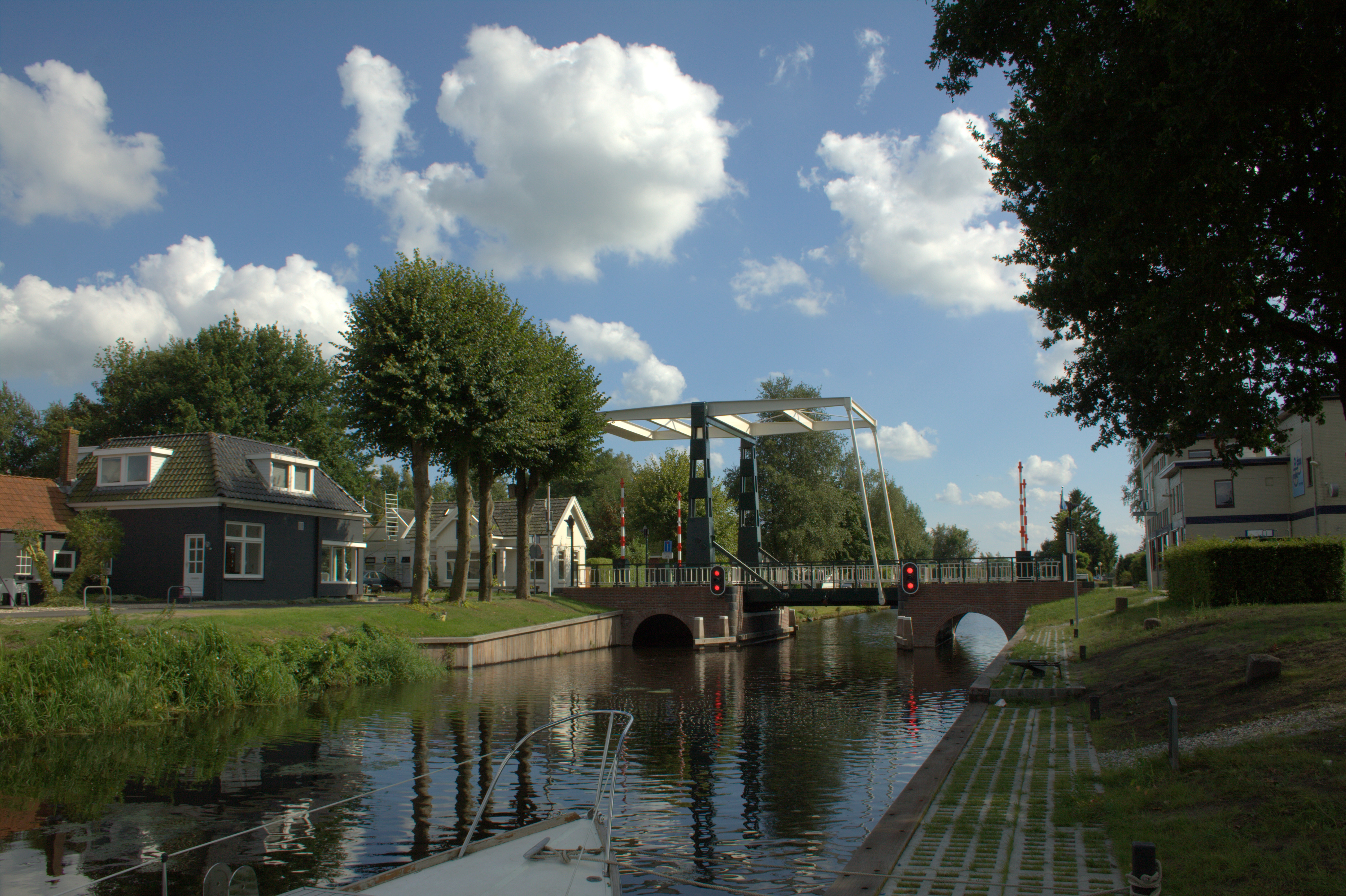 Het dorp Terwispel ter hoogte van de Nieuwe Vaart. Het dorp heeft ongeveer 1000 inwoners.